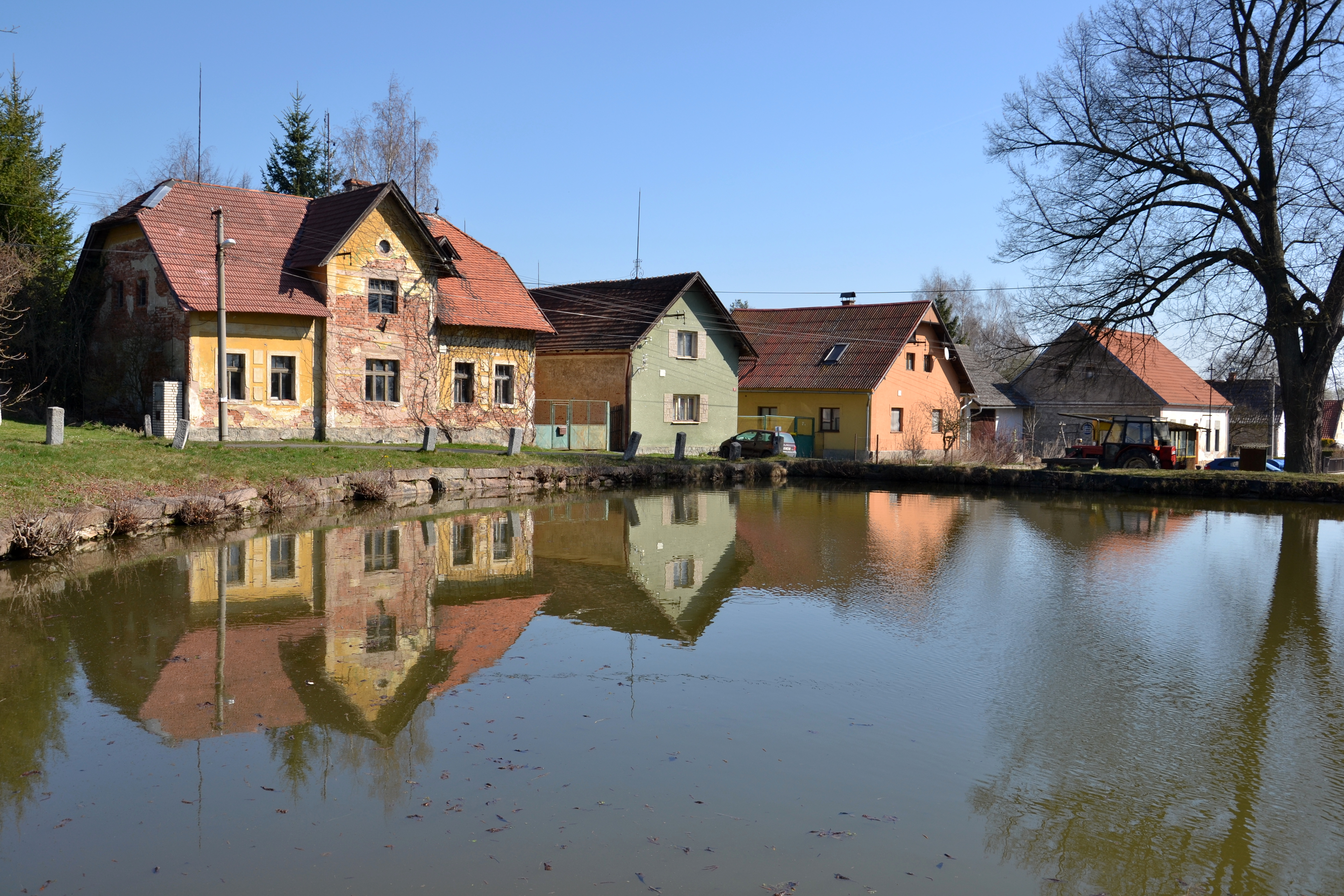 Lhota – Domy na severním okraji návsi